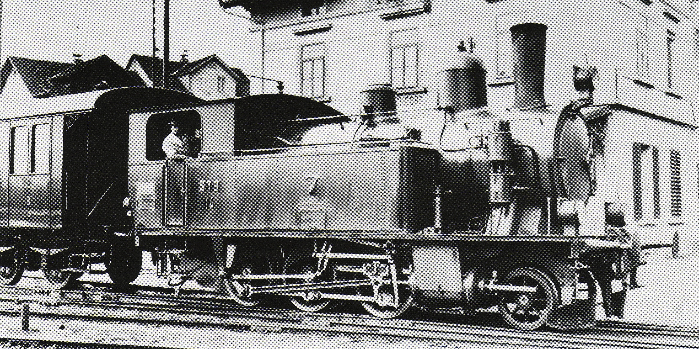 Tender-Locomotive Ed 3/4 Nr. 14 der Seethalbahn, gebaut 1903 inn der Schweizeriſchen Locomotiv- und Machines-Fabrique zů Winterthur (Fabr.-Nr. 1510), 1916 als Nr. 360 an die Società Veneta per coſtruzione ed eſercizio di ferrovie ſecondarie, 1959 als Baulocomotive an die Ferrotramviaria in Apulien, Abbruchjahr unbekannt.